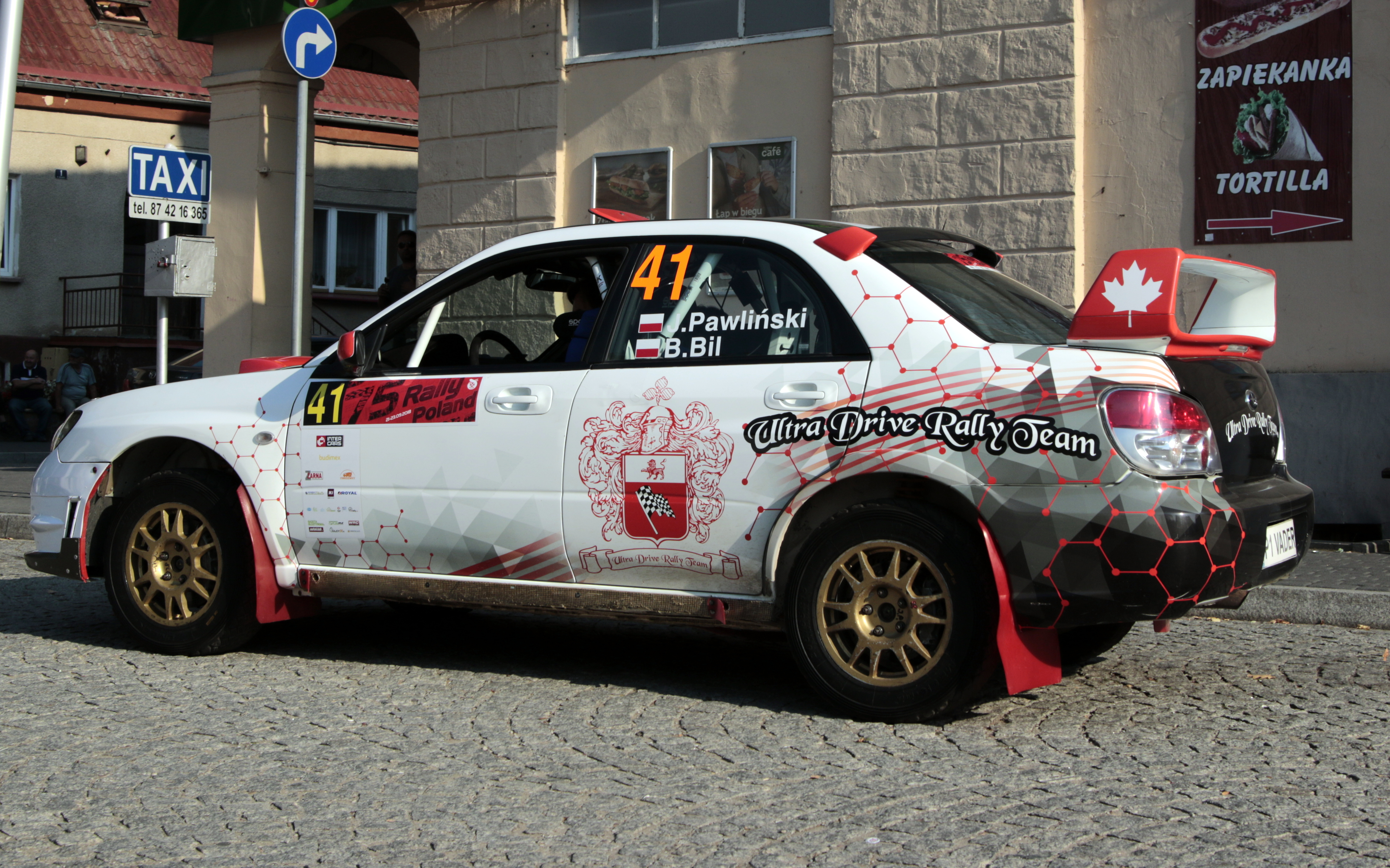 Rajd Polski 2018 - Jarosław Pawliński